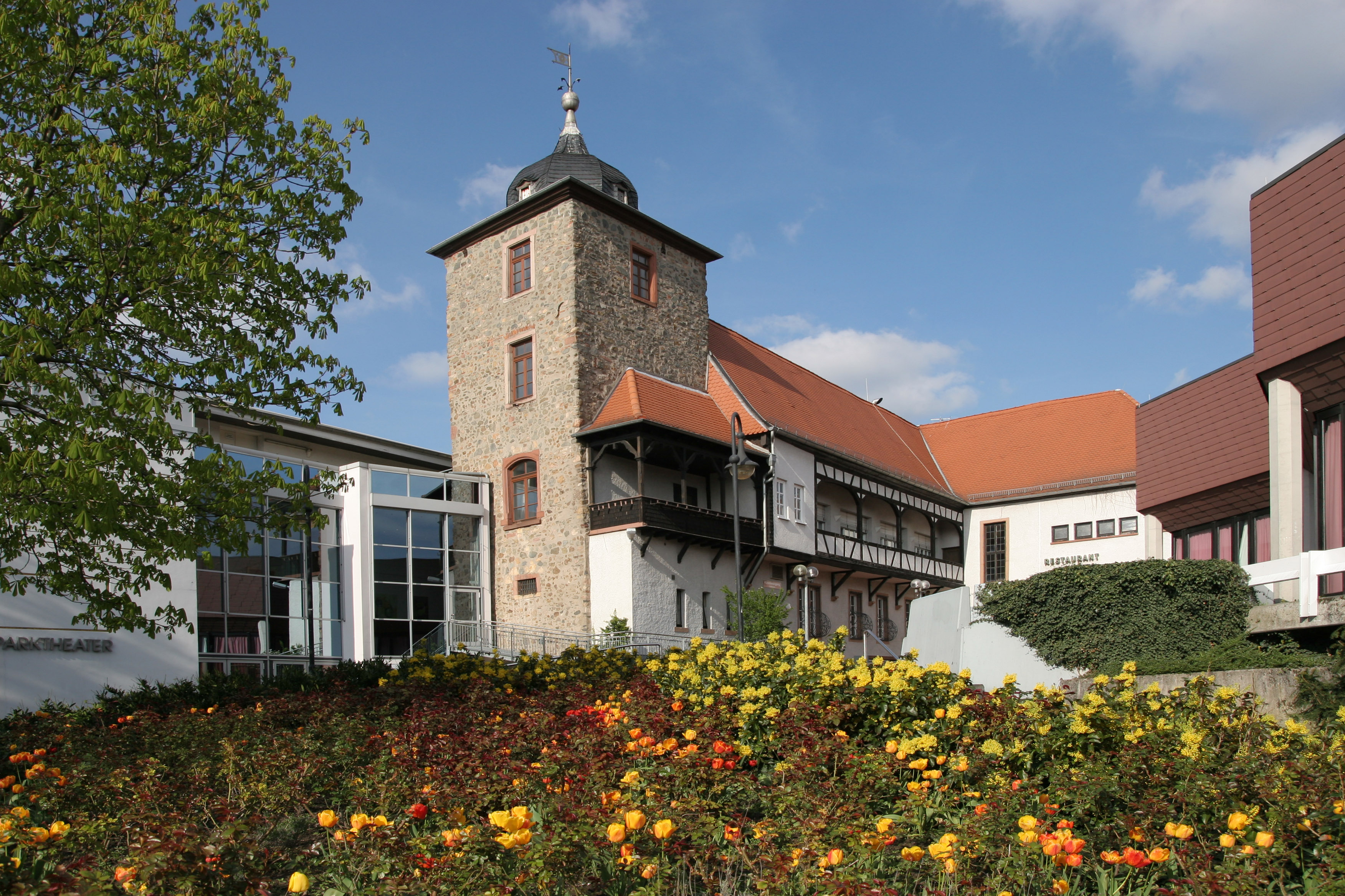 Der Dalberger Hof in Bensheim (Südhessen). Links davon das Parktheater und rechts das Bensheimer Bürgerhaus